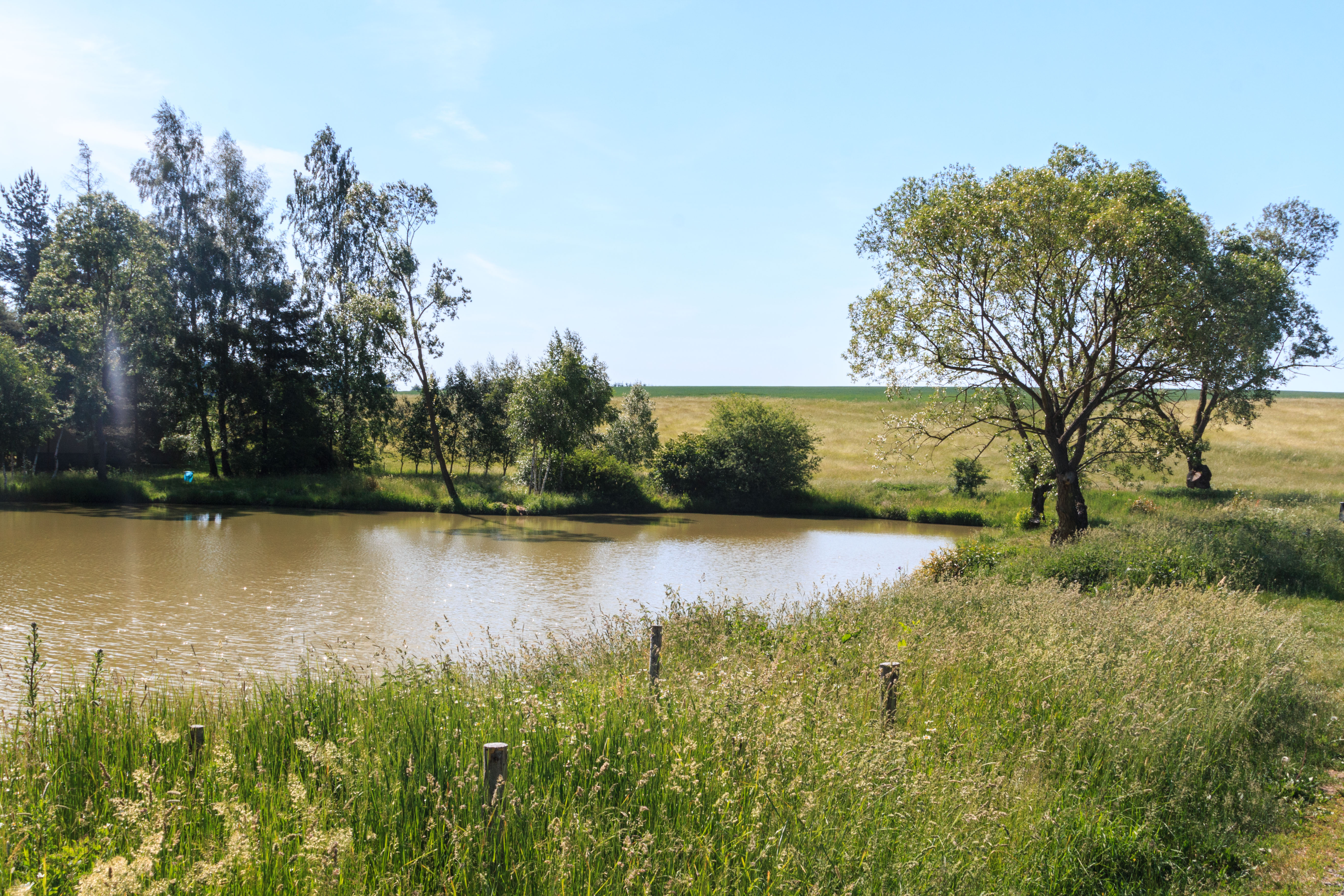 Nový rybník (Pomezí) Project: Vodstvo.